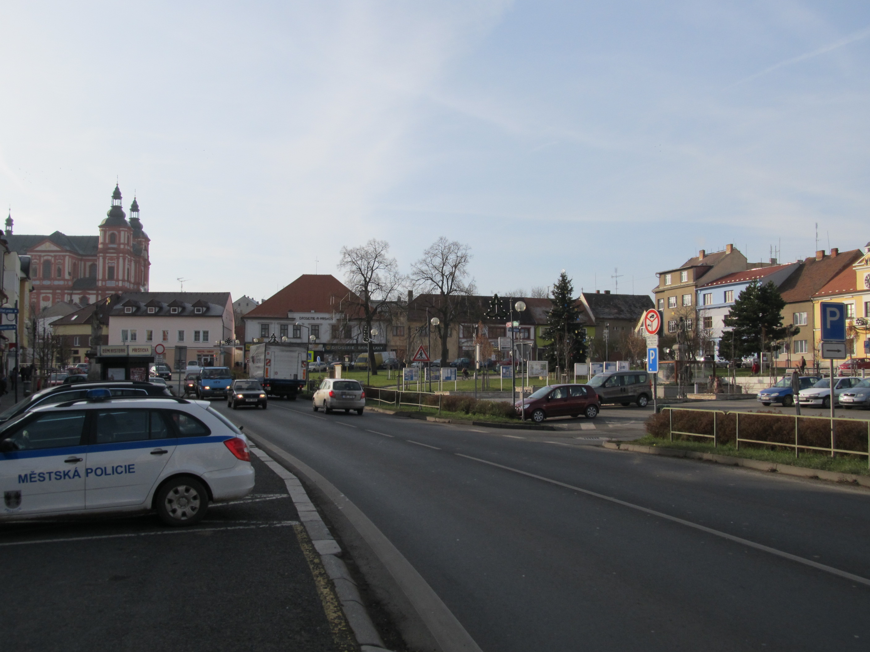 Přeštice - náměstí